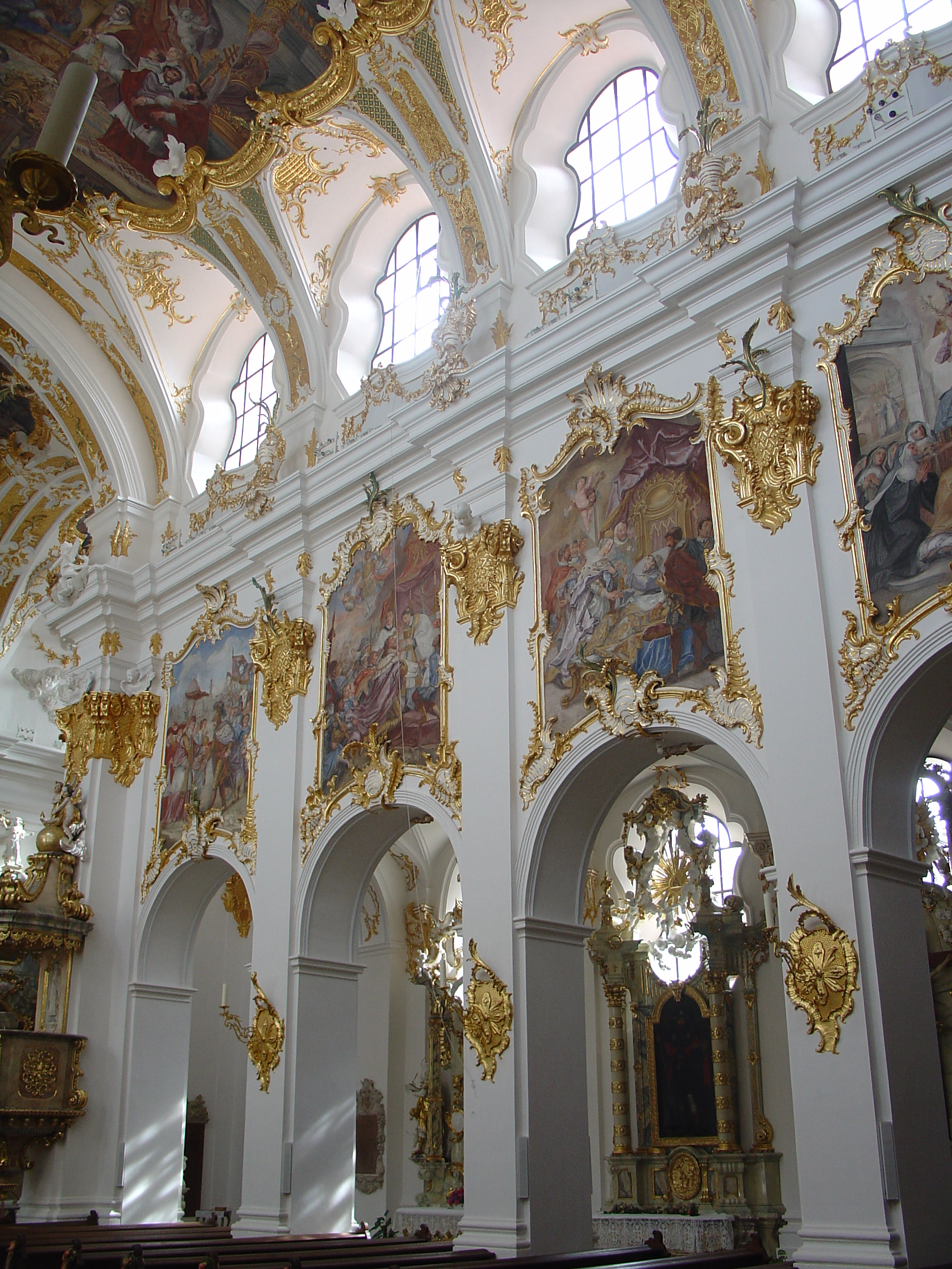 Alte Kapelle in Regensburg